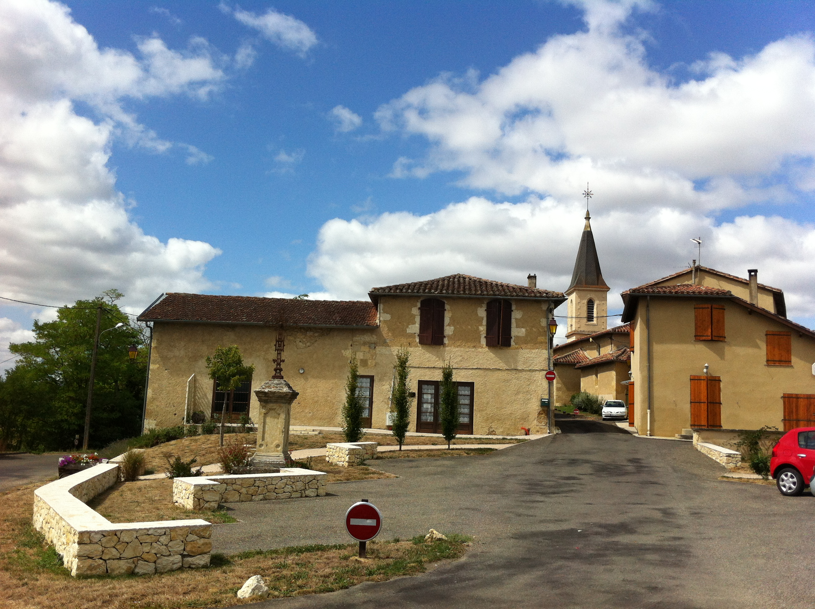 Duran est un village du Gers situé près d'Auch